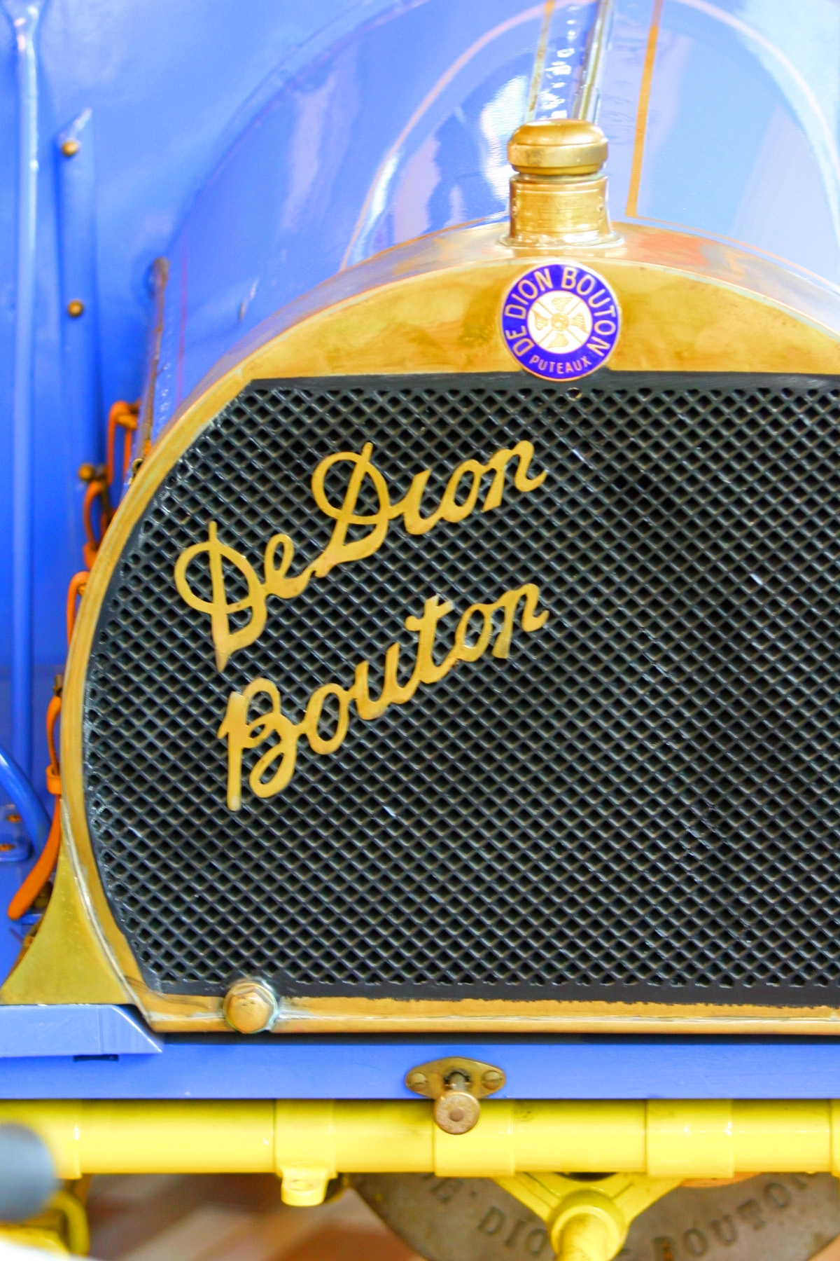 Museo Umberto Panini (Modena)